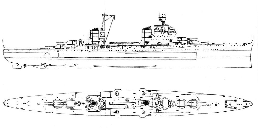 Итальянский тяжелый крейсер Больцано, схема.